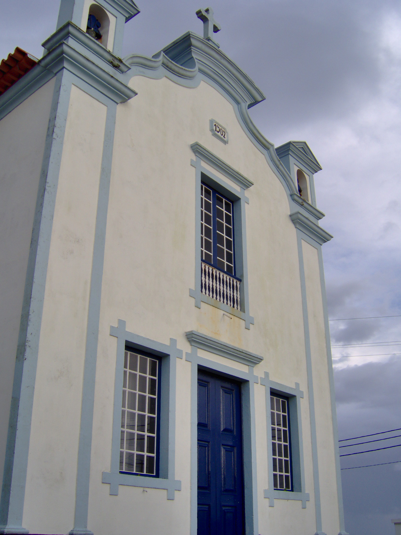 Ermida de Santo Amaro, Ribeirinha, Angra do Heroísmo, ilha Terceira, Açores